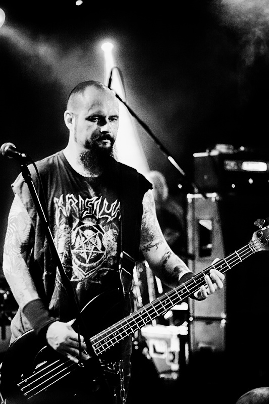 Witchmaster, Wrocław, Firlej, 6.09.2011